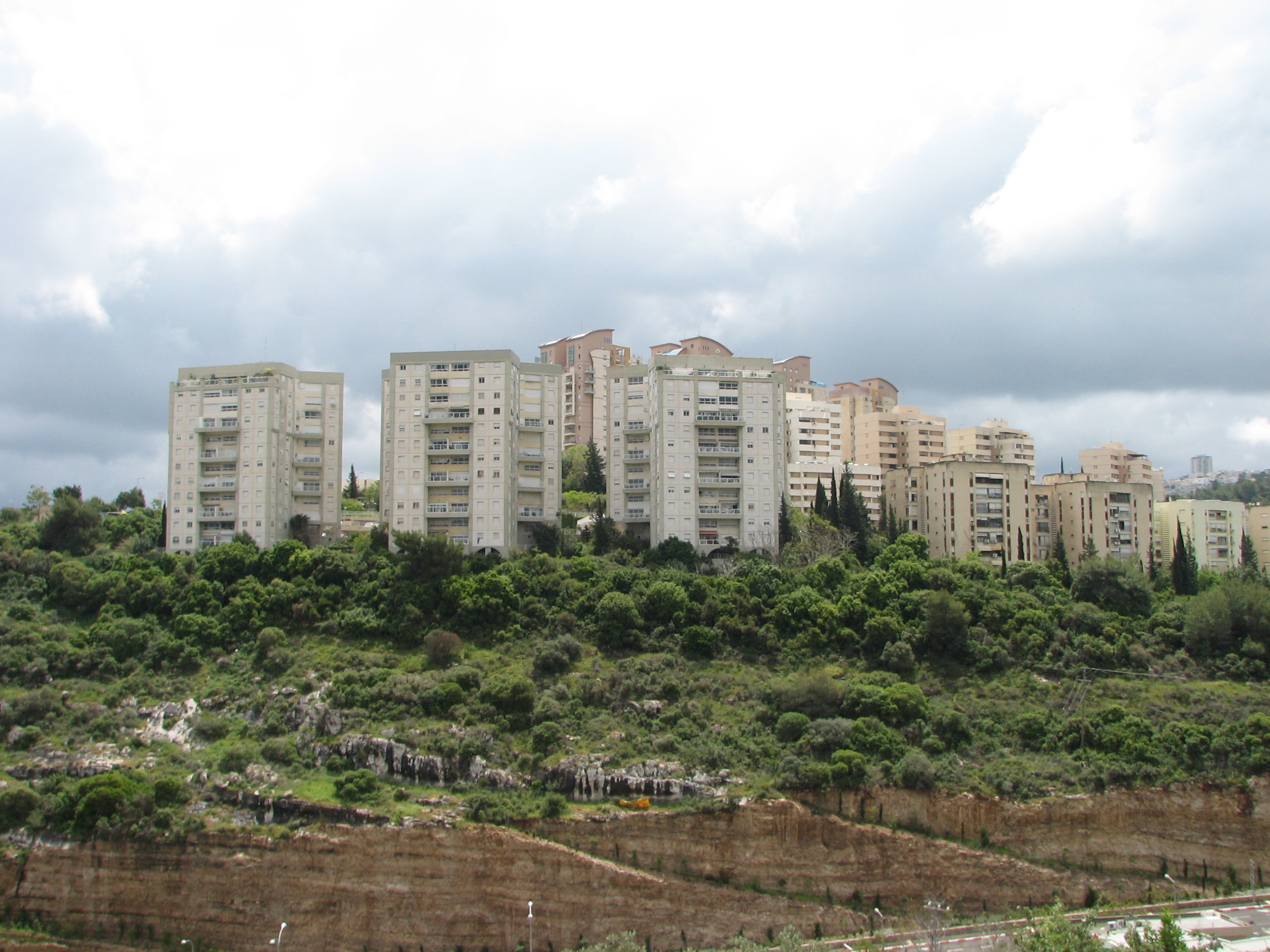 Ramot Sapir, Neighborhood, Haifa Israel רמות ספיר, על שם פנחס ספיר, נמצאת במבואותיה המערביים של נווה שאנן, וגובלת ברוממה. היא הוקמה בתחילת שנות ה-80